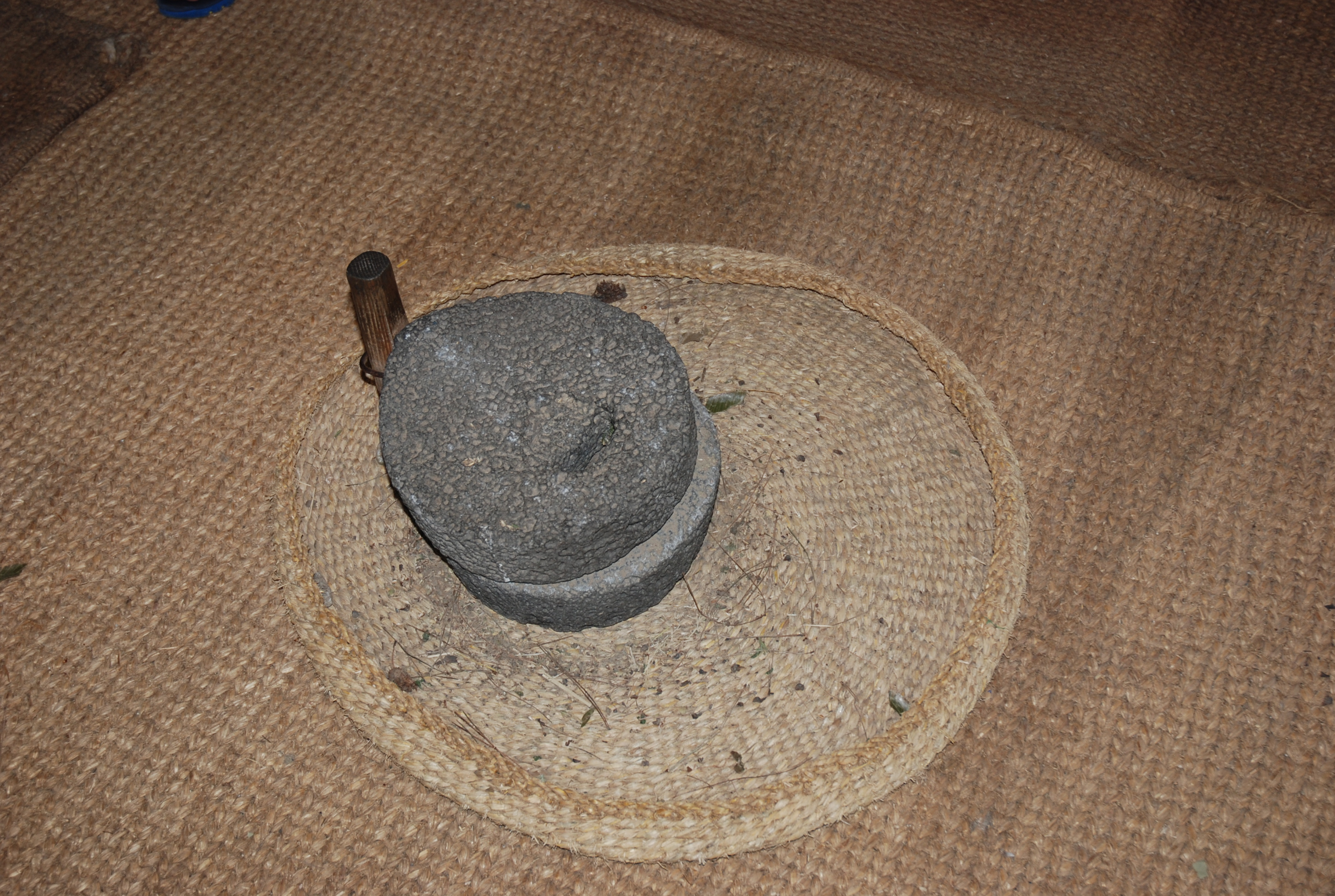 멍석 위의 맷돌